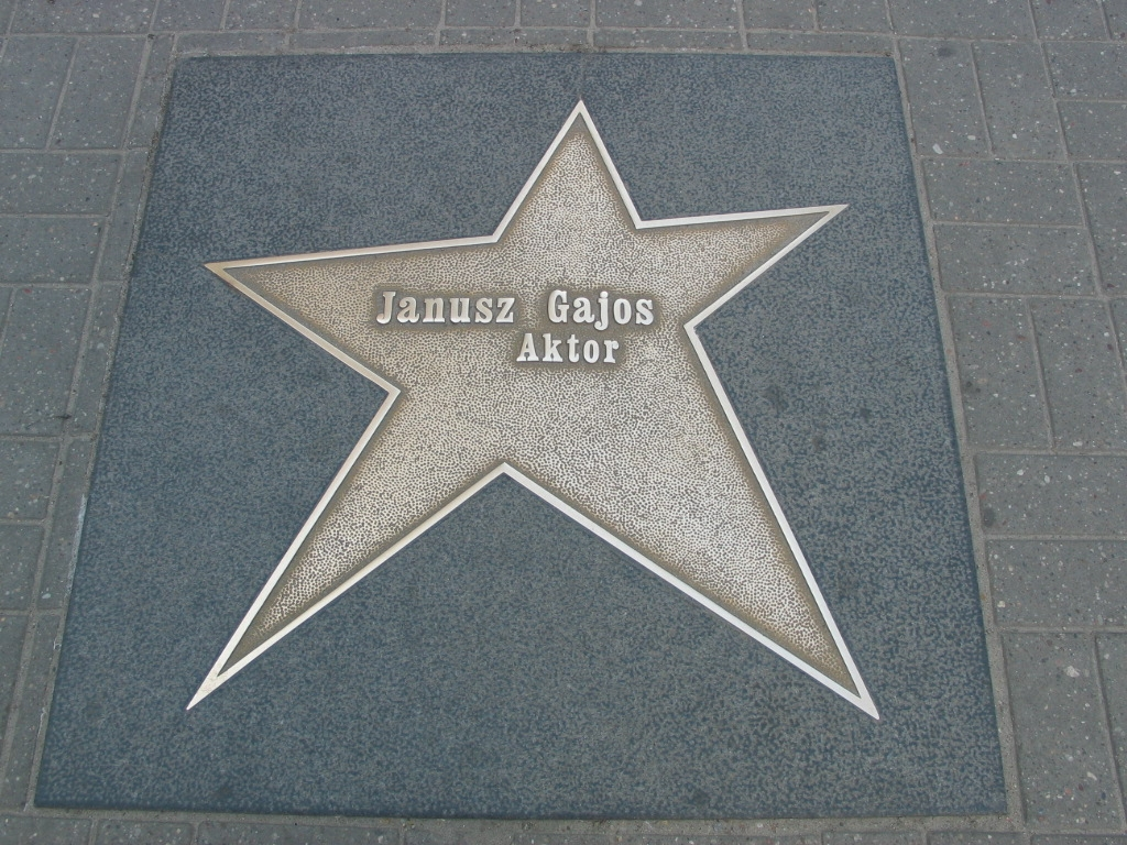 Łódź Walk of Fame - Janusz Gajos